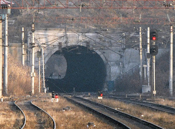 Железнодорожный тоннель в Хабаровске